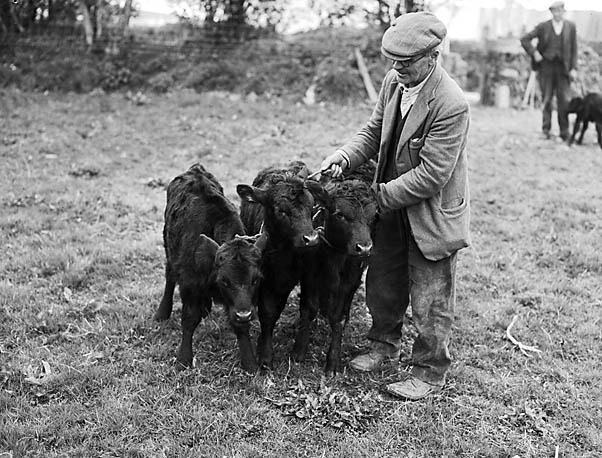 Teitl Cymraeg/Welsh title: Gwartheg duon Cymreig a fridiwyd gan Joseph Evans, Tyndomen, Tregaron. Cyfrwng/Medium: Negydd ffilm / Film negative Cyfeiriad/Reference: (gch08320) Rhif cofnod / Record no.: 3368736 Rhagor o wybodaeth am gasgliad Geoff Charles yn Llyfrgell Genedlaethol Cymru More information about the Geoff Charles Collection at the National Library of Wales Mae ffotograffau Geoff Charles hefyd yn rhan o Broject Europeana Libraries Geoff Charles' photographs also form part of the Europeana Libraries Project